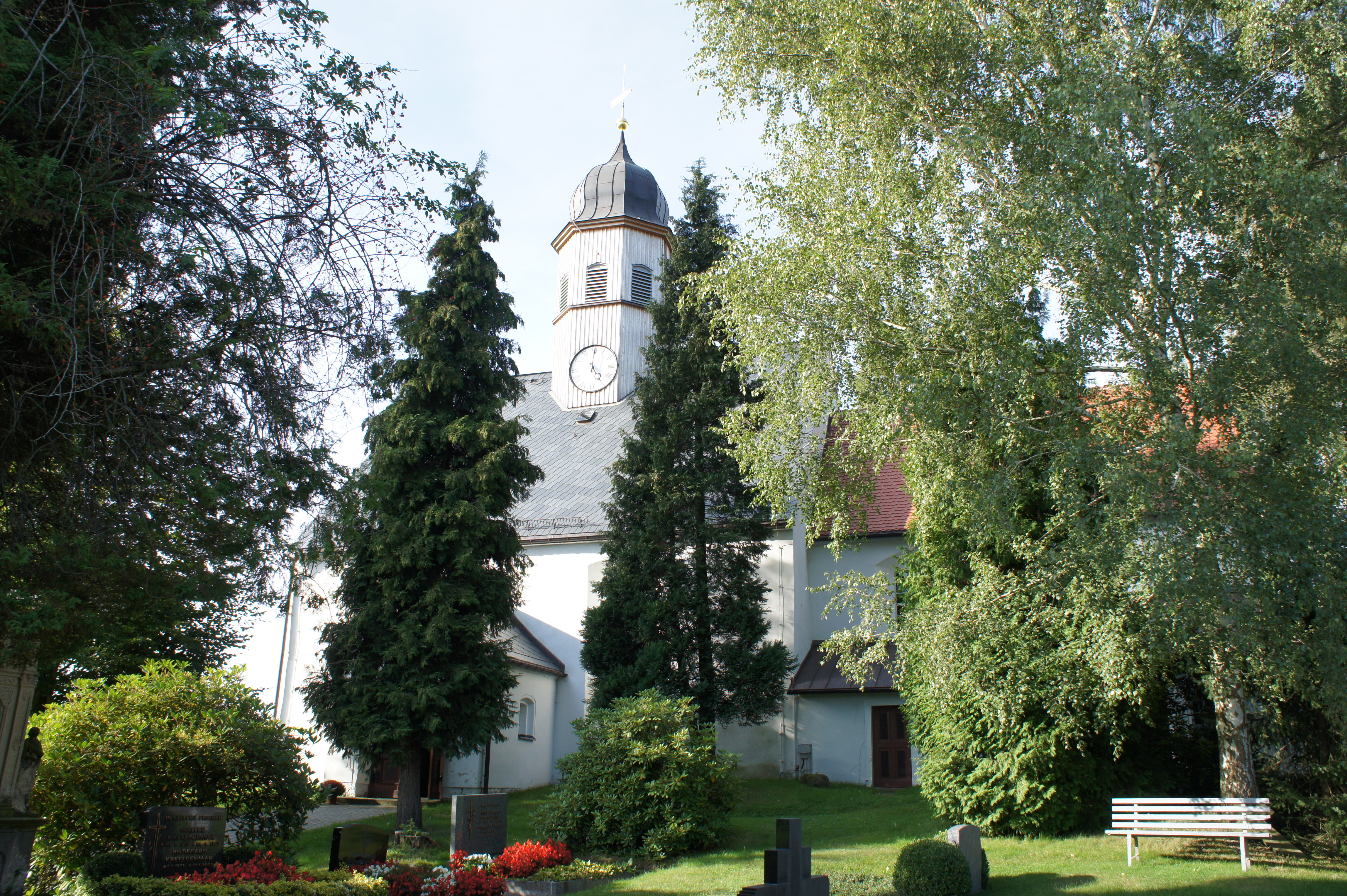 St. Martins Kirche Lauterbach. Evangelische Pfarrkirche aus dem 15. Jh. Der östliche Teil entstand bereits im 12./13. Jahrhundert. Schlichte Saalkirche mit eingezogenem, geradem und geschlossenem Chor.